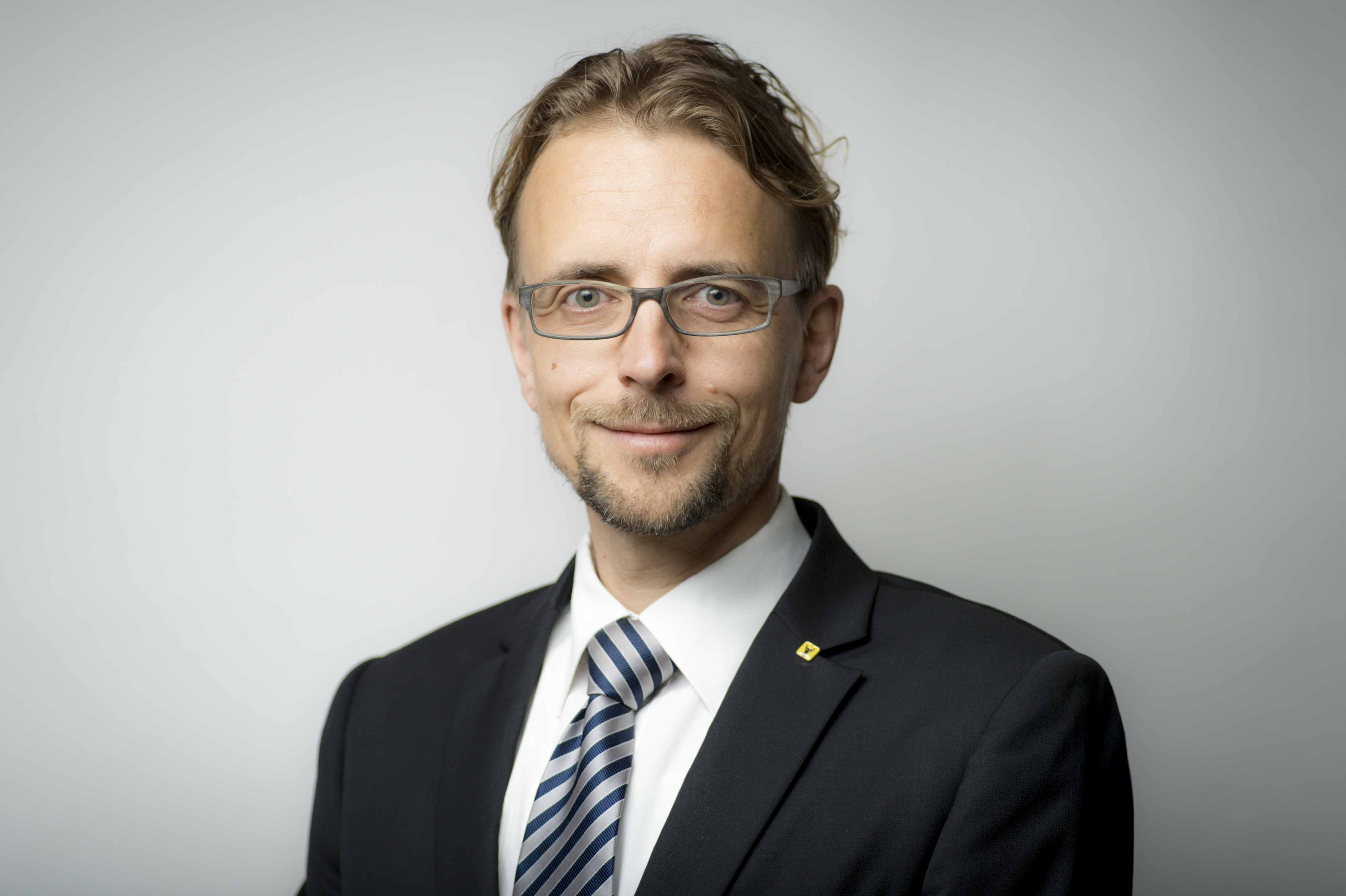 Portraitfoto